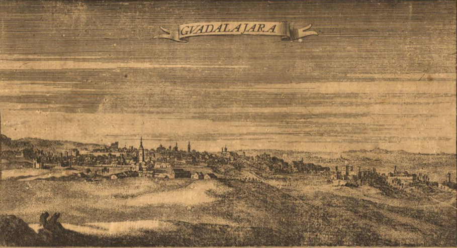 Vista panorámica de la ciudad de Guadalajara (Castilla-La Mancha - España) en 1687, según dibujo de Juan Francisco Leonardo. Corresponde a un detalle del Mapa del Arzobispado de Toledo, impreso por iniciativa del arzobispo Luis Manuel Fernández de Portocarrero.